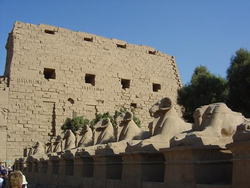 Karnak Tapınak girişi.